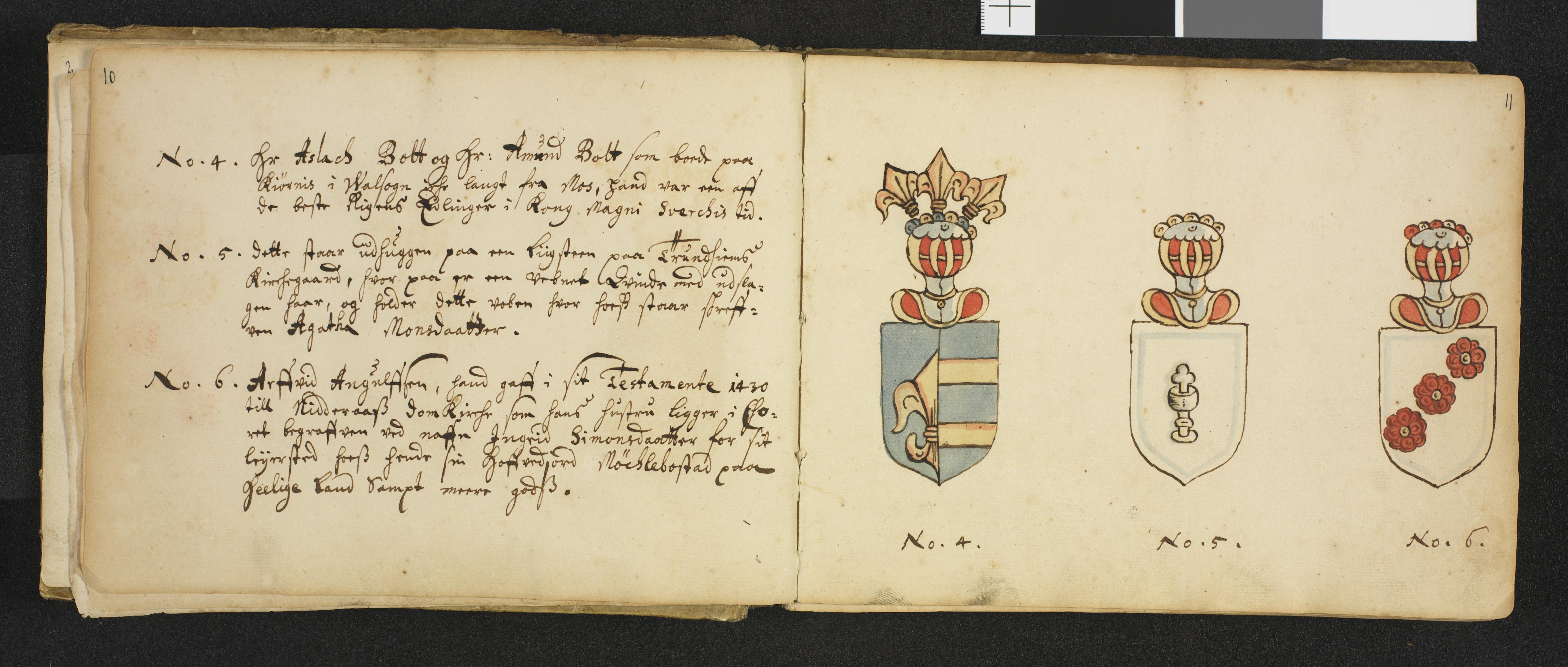 Illustrasjon hentet fra et privatarkiv i Nasjonalbiblioteket med tittelen "Insignia quædam virorum illustrium in Norvegia quodam habitantium" av Iver Nielssøn Hirtzholm.